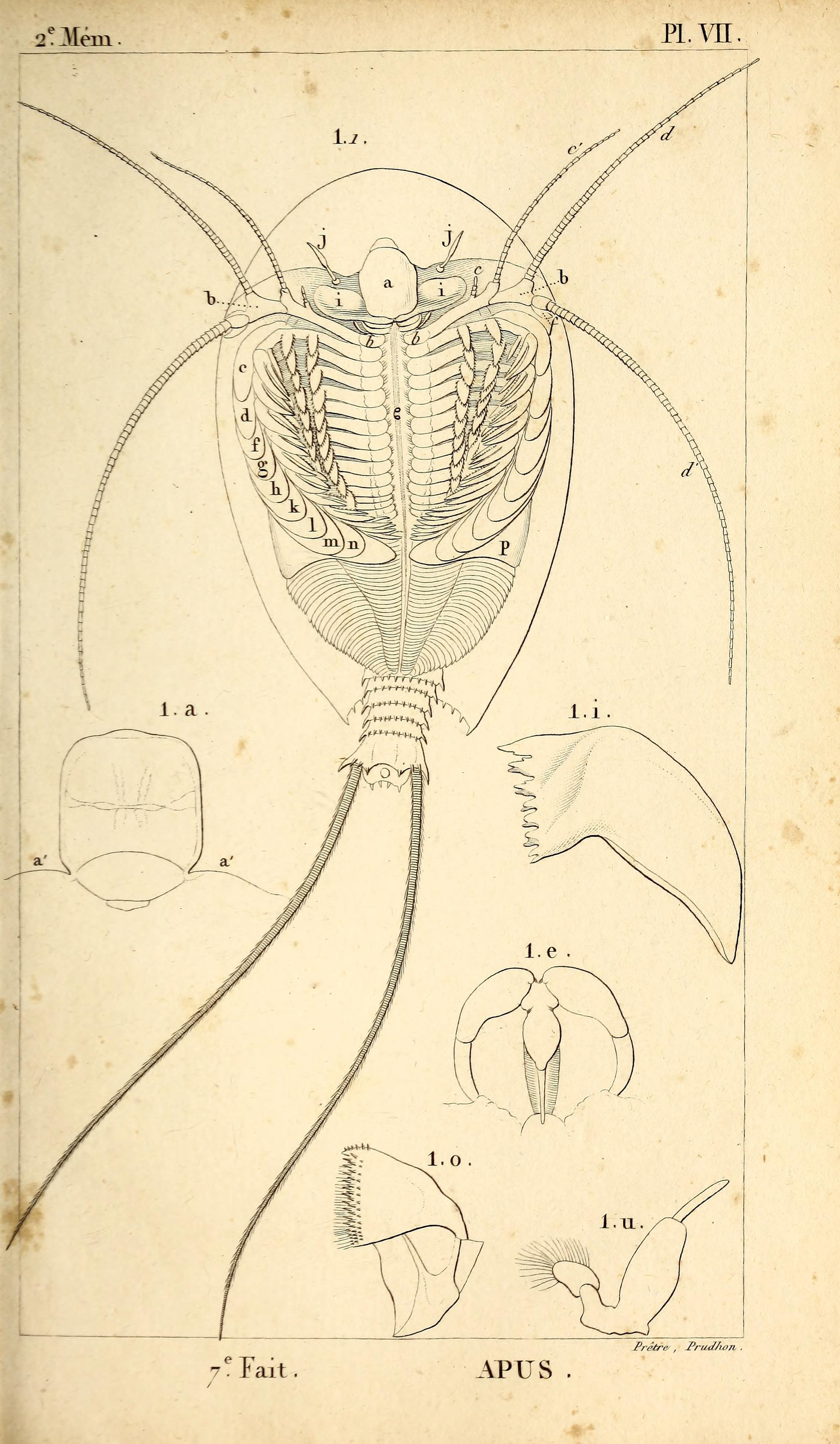 Mémoires sur les animaux sans vertèbres /